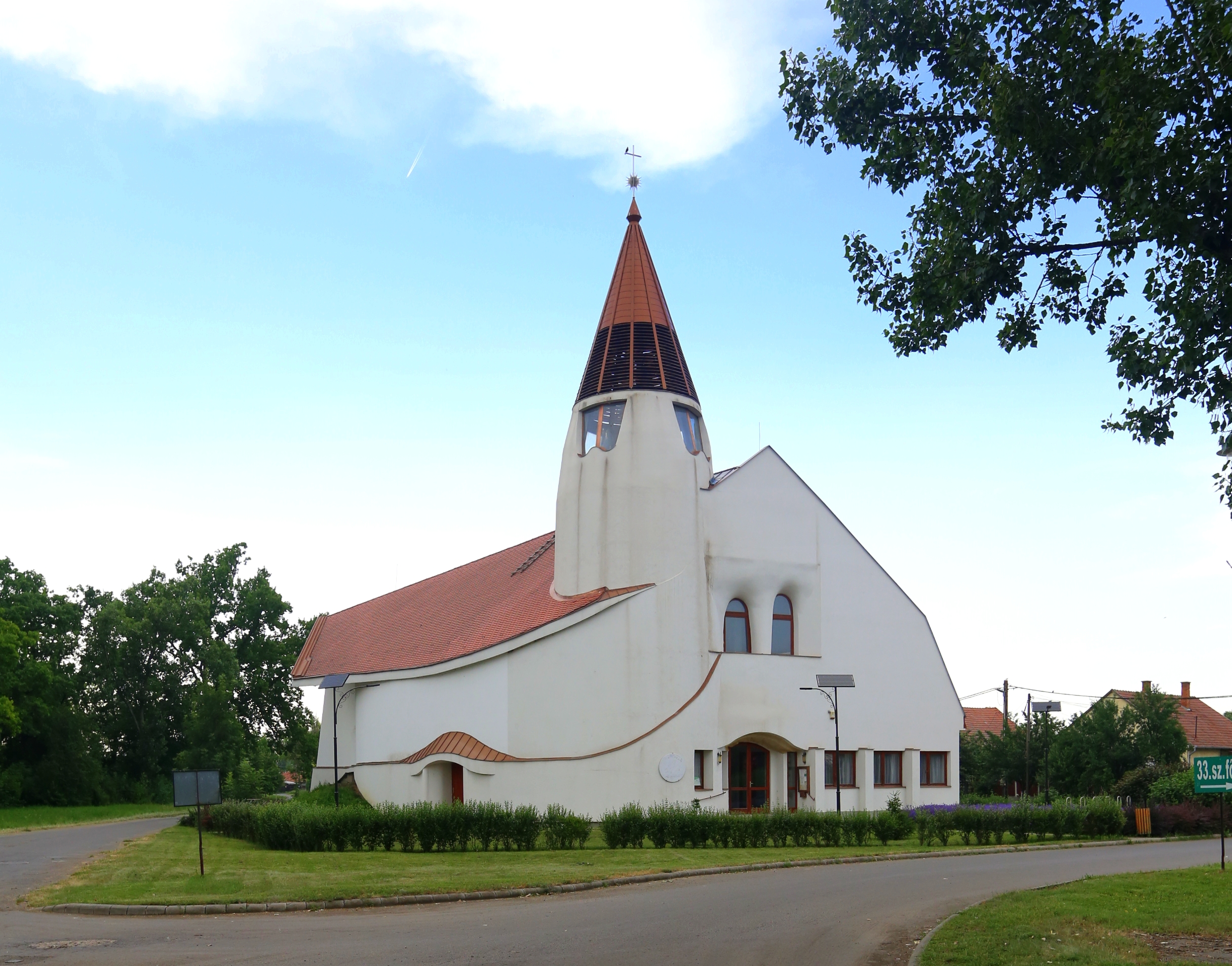 Hortobágyi Jó Pásztor Ökumenikus Templom (Hortobágy, Hunyadi u. 4, 4071)